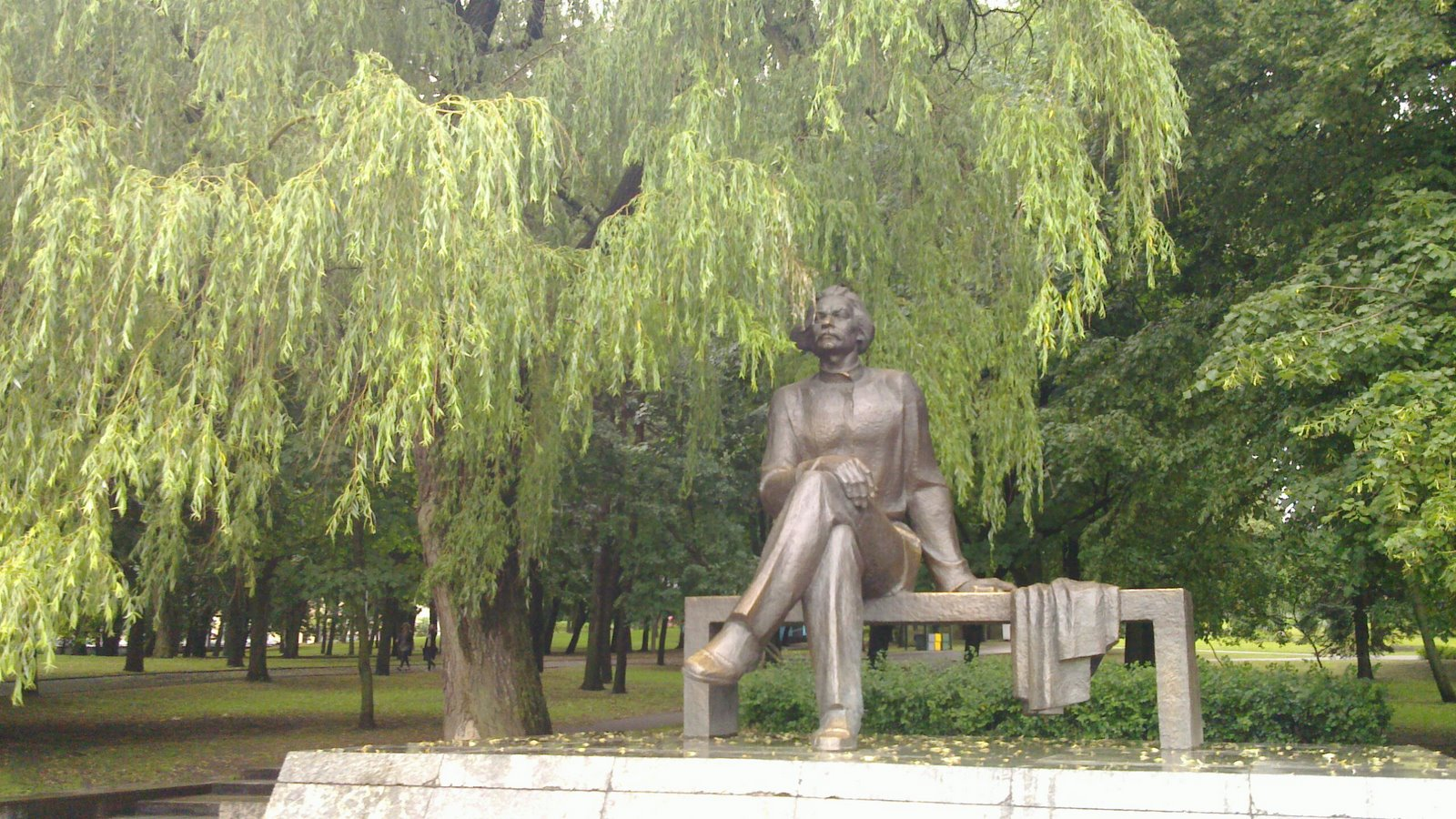 памятник Максиму Горькому